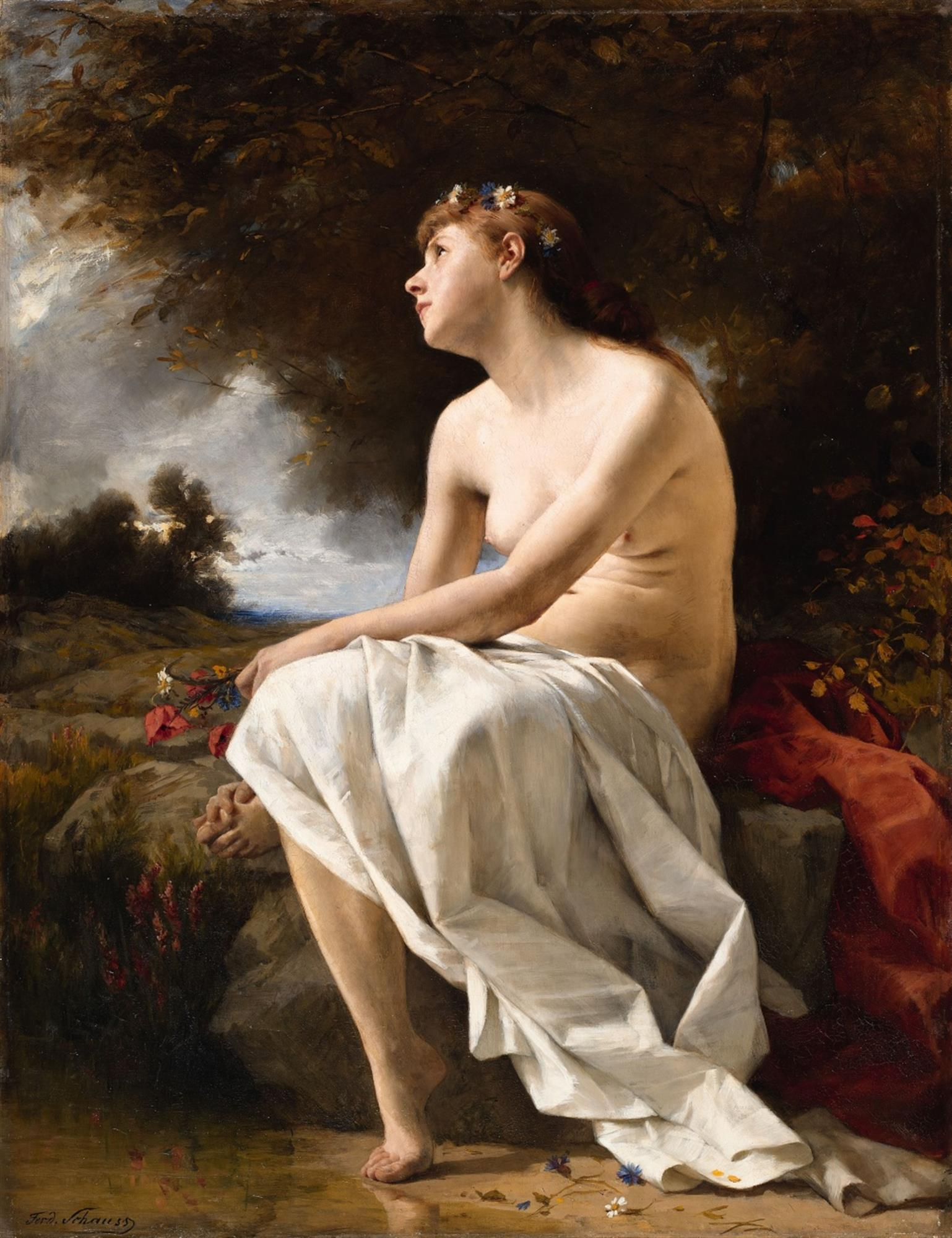 Elegie